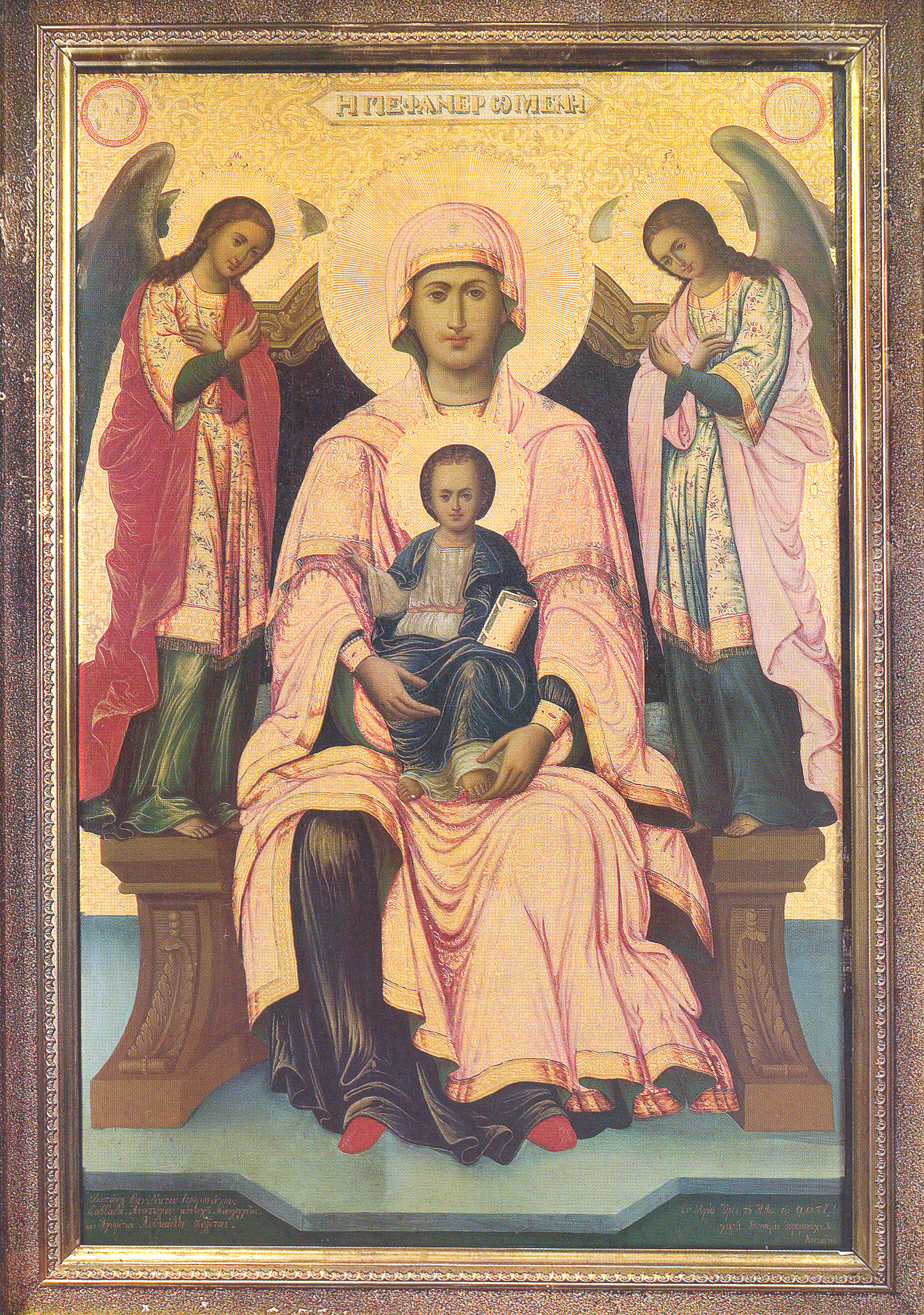 Εικόνα Φανερωμένη Λευκάδα